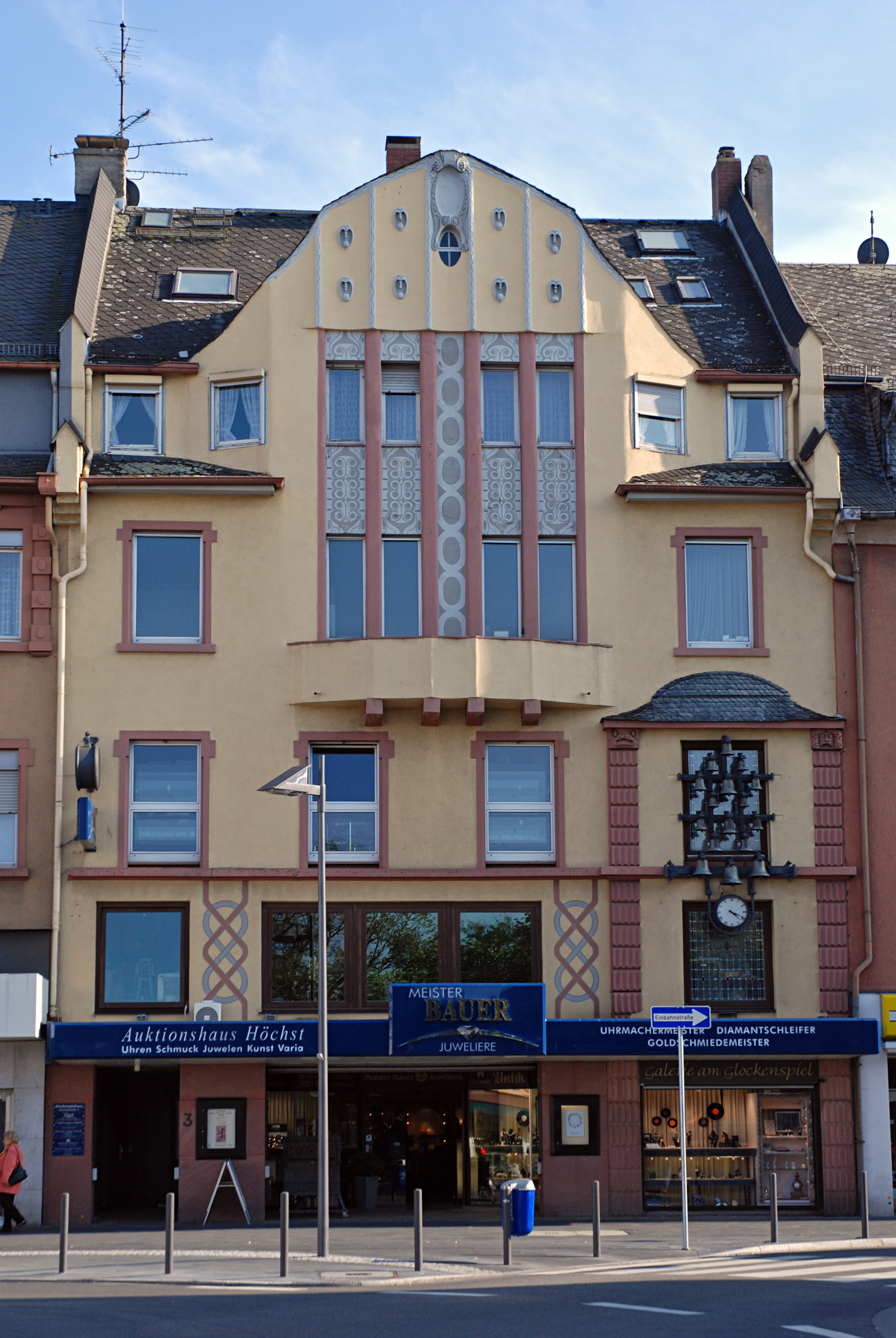 Glockenspielhaus am Dalbergplatz in Frankfurt-Höchst